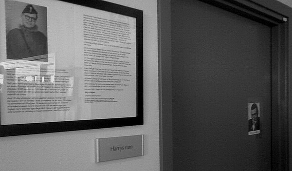 Harry Södermans minnesrum på Nykvarns bibliotek.